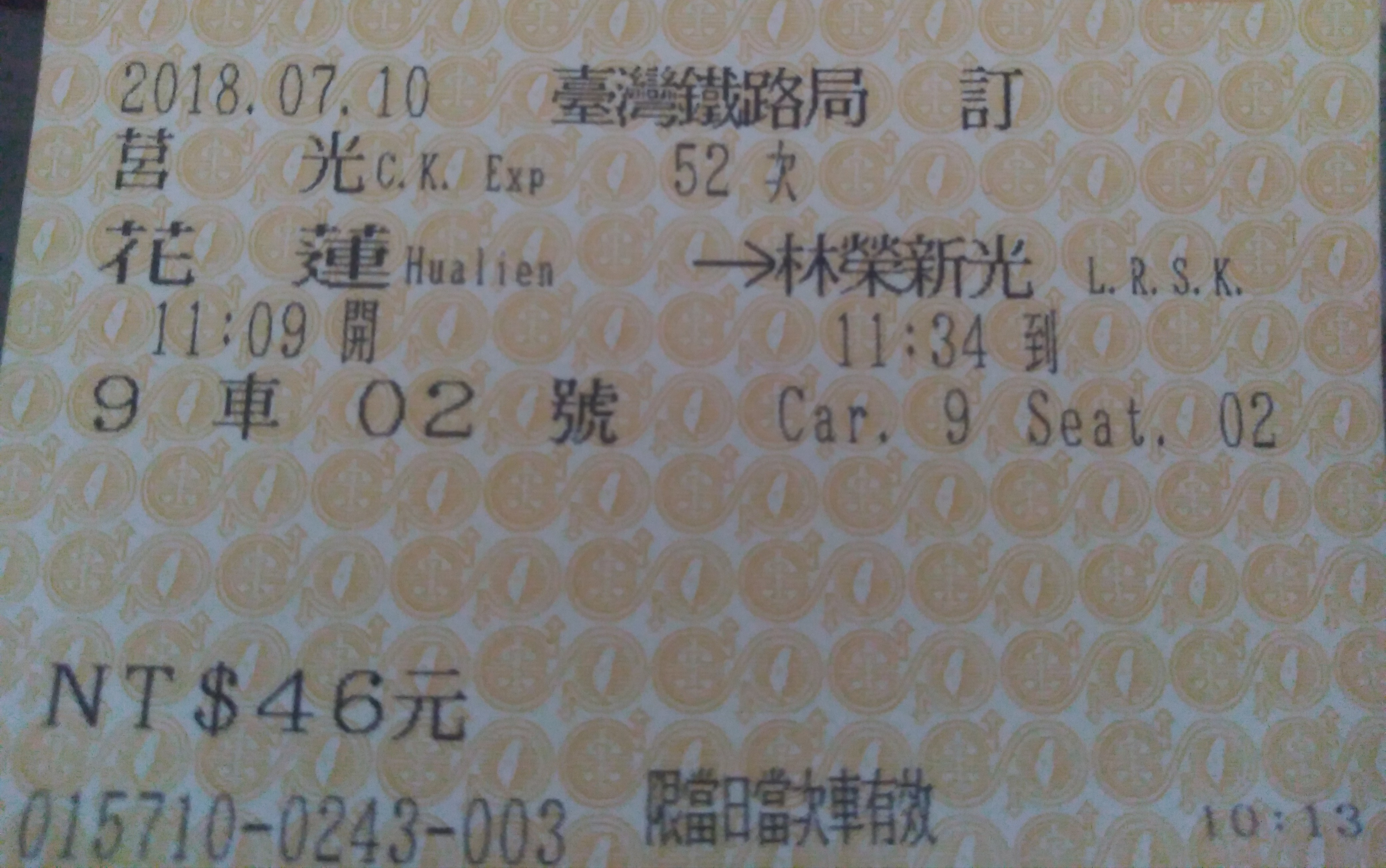 臺灣鐵路管理局莒光號觀光列車花蓮站往林榮新光站之坐票。不發售站票。